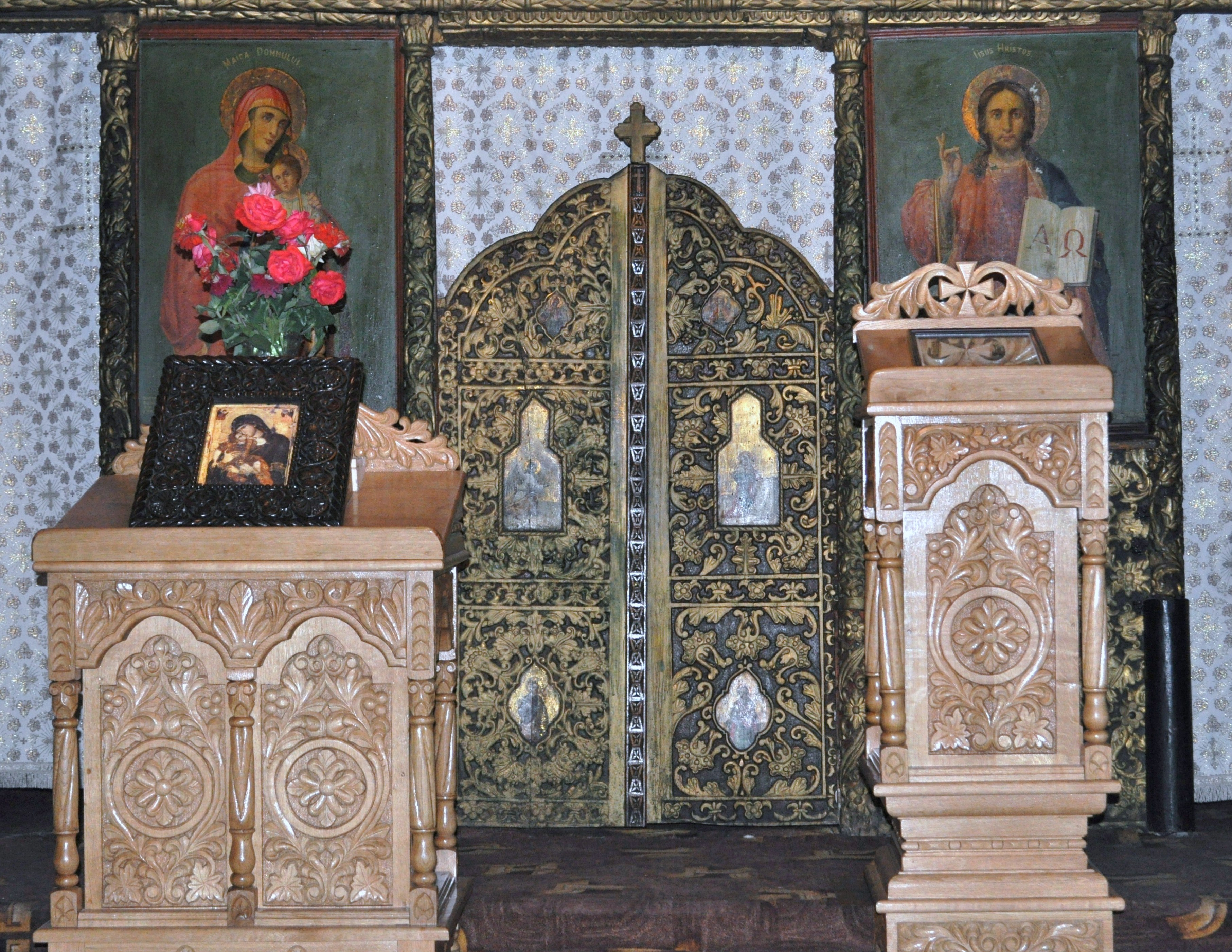 Ansamblul schitului Crasna, județul Gorj